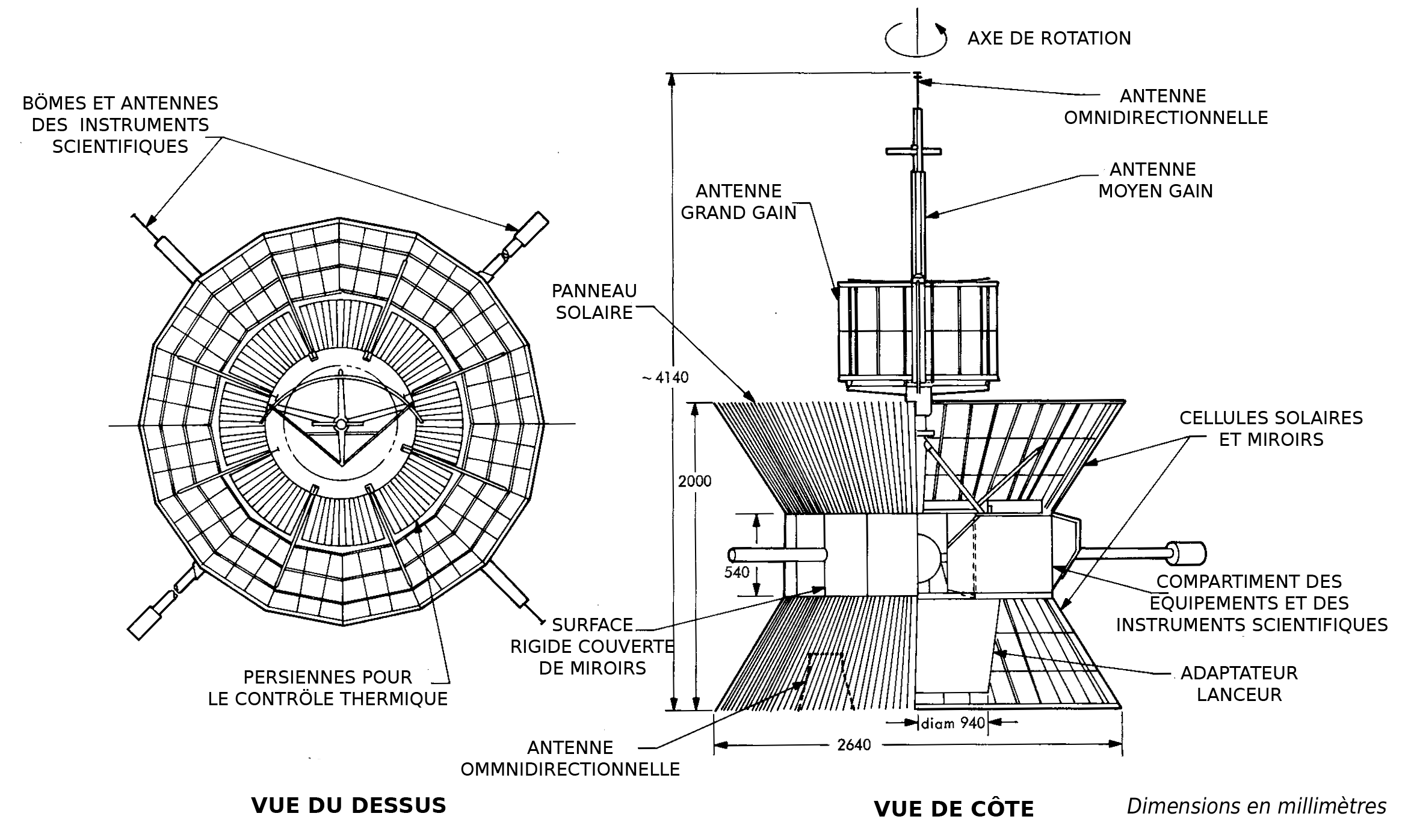 Schéma de la sonde spatiale solaire Helios (1974 et 1976)